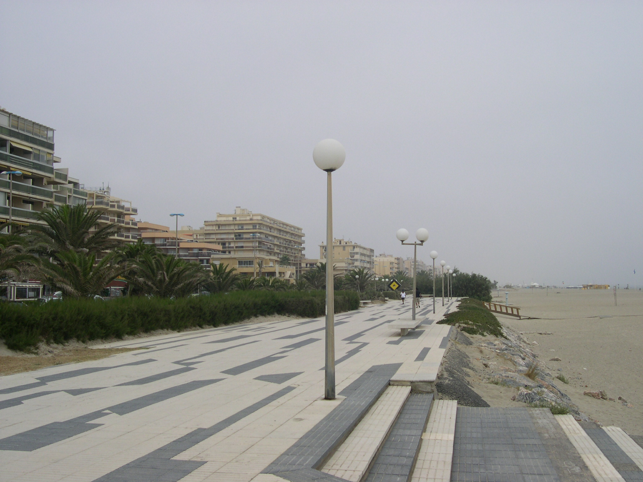 Canet-en-Roussillon, France.